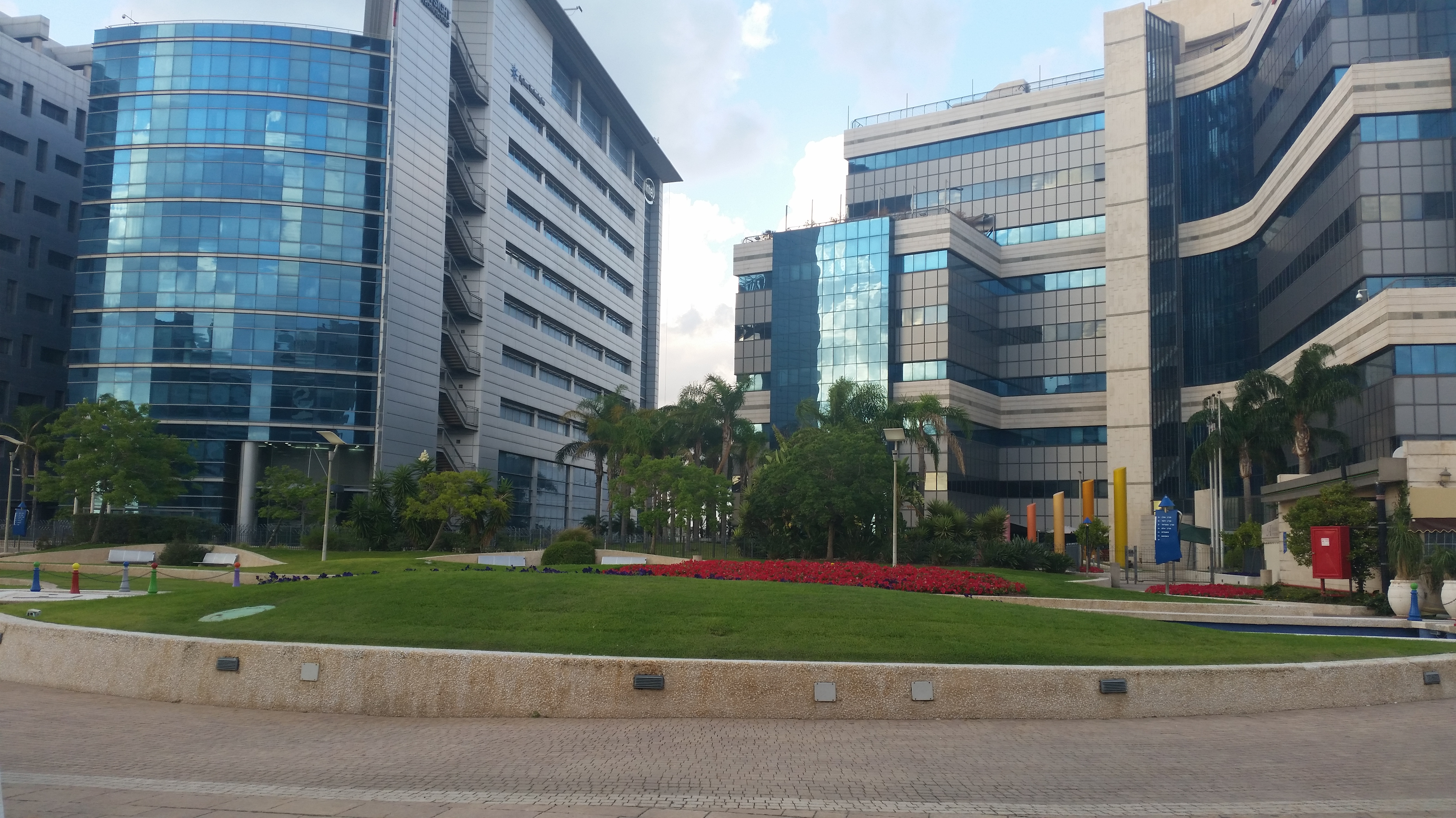 פארק אזורים, פתח תקווה - מאי 2016